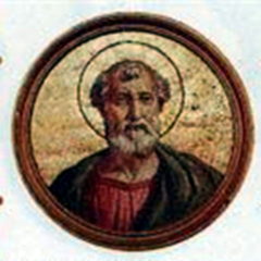 Sixtus I